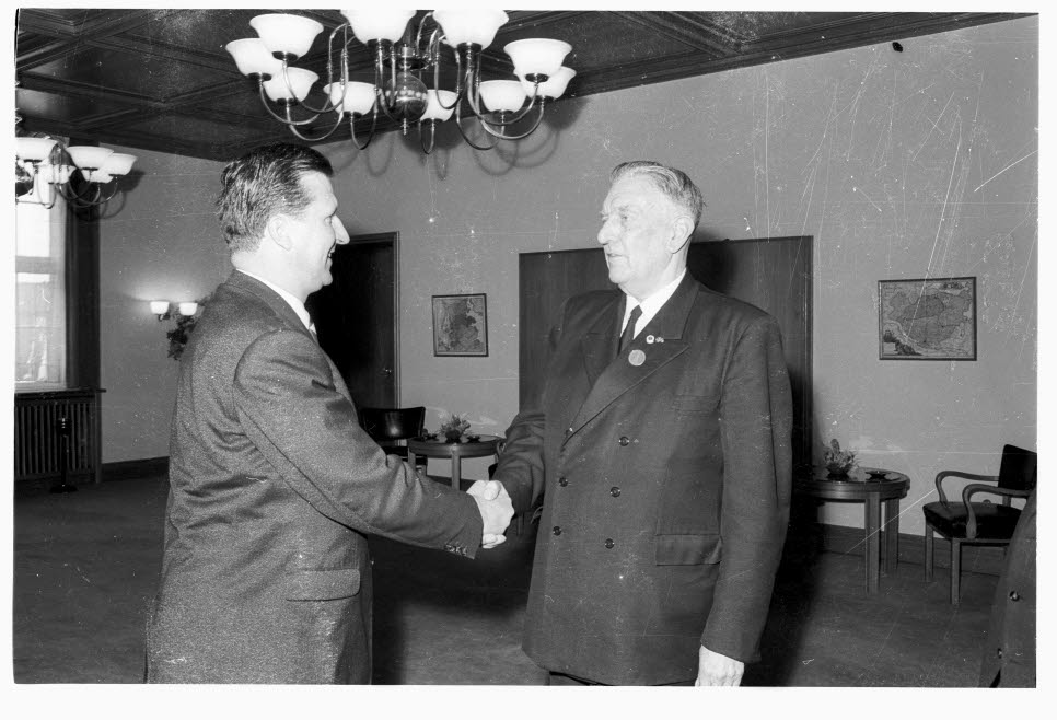 Empfang für den Präsidenten Konteradmiral a.D. Ernst Lucht (rechts) und 50 Mitglieder des Präsidiums des Deutschen Marinebundes beim Oberbürgermeister Günther Bantzer (links) im Rathaus.